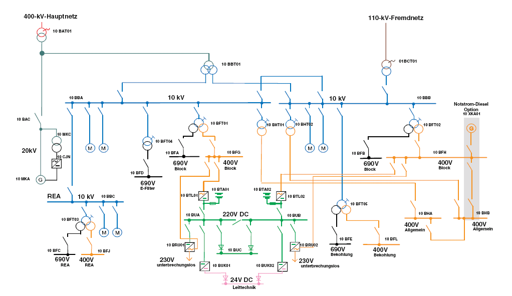 Elektrische Energieverteilung eines Kohlekraftwerkes